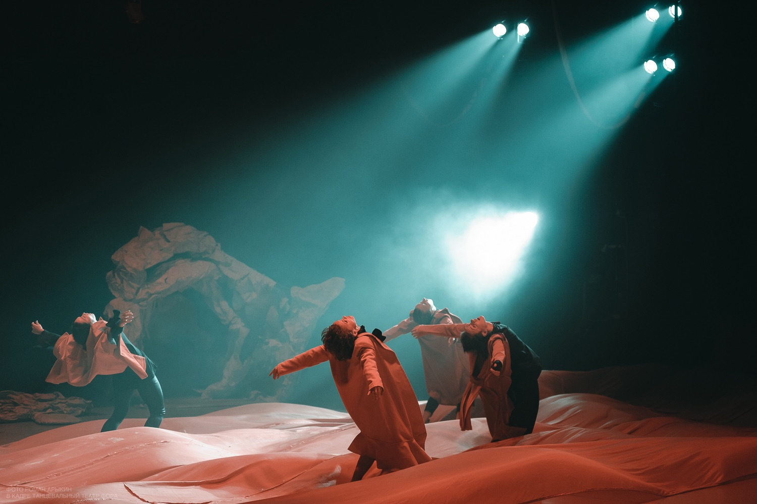 В кадре - Танцевальный театр Фора. Фотограф - Роман Арыкин